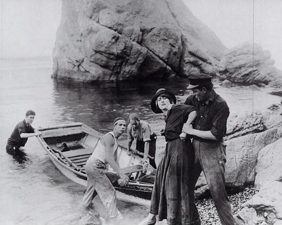 Imagen de la película de Francis Ford Smuggler's Island (1915) en la que se ve a Grace Cunard amenazada por Harry Schumm. A la izquierda se ve a Jack Ford.